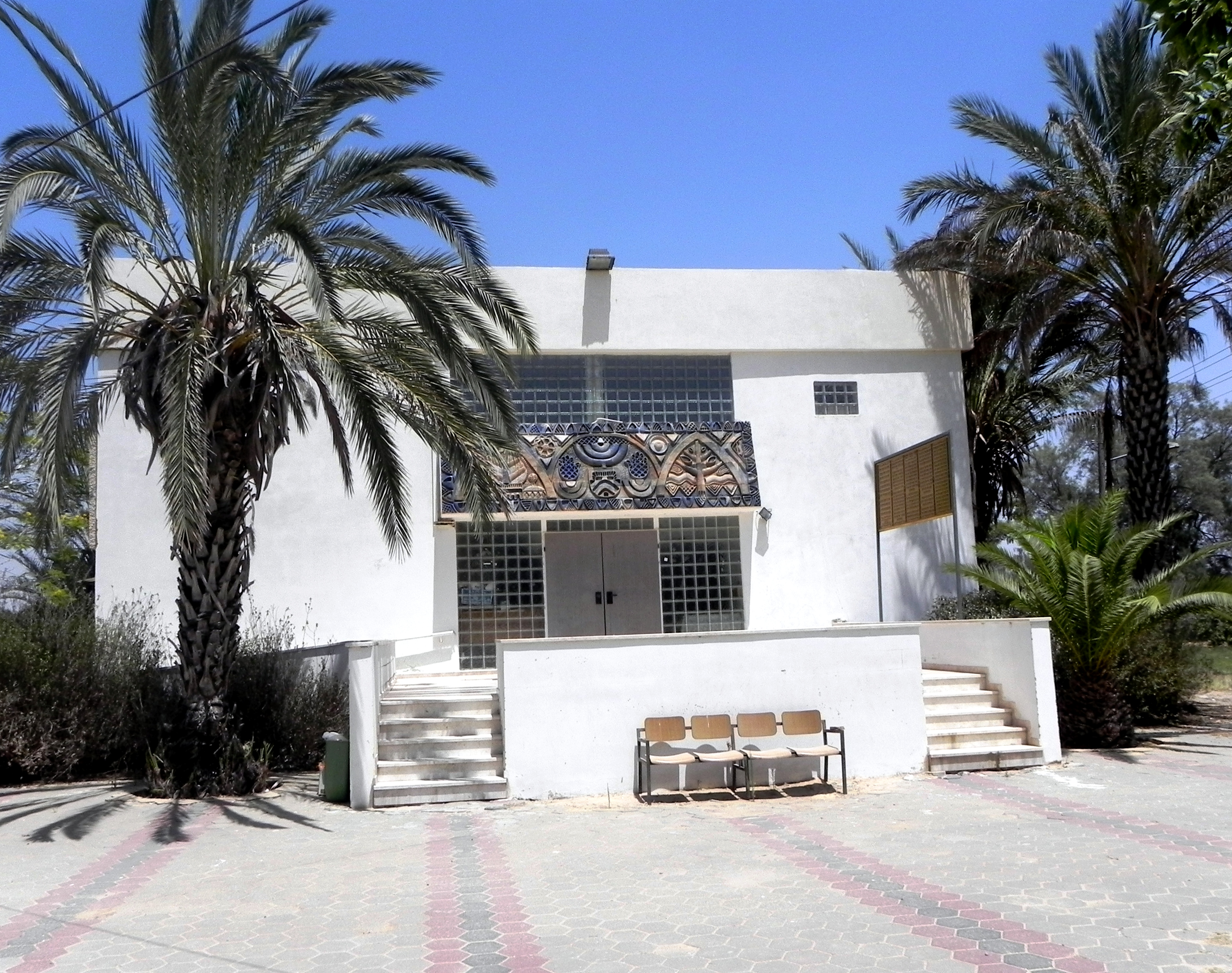 זרועה בית הכנסת